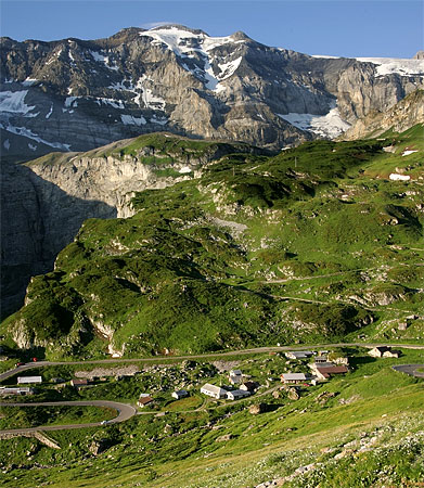 Klausenpass (Vorfrutt) mit Clariden